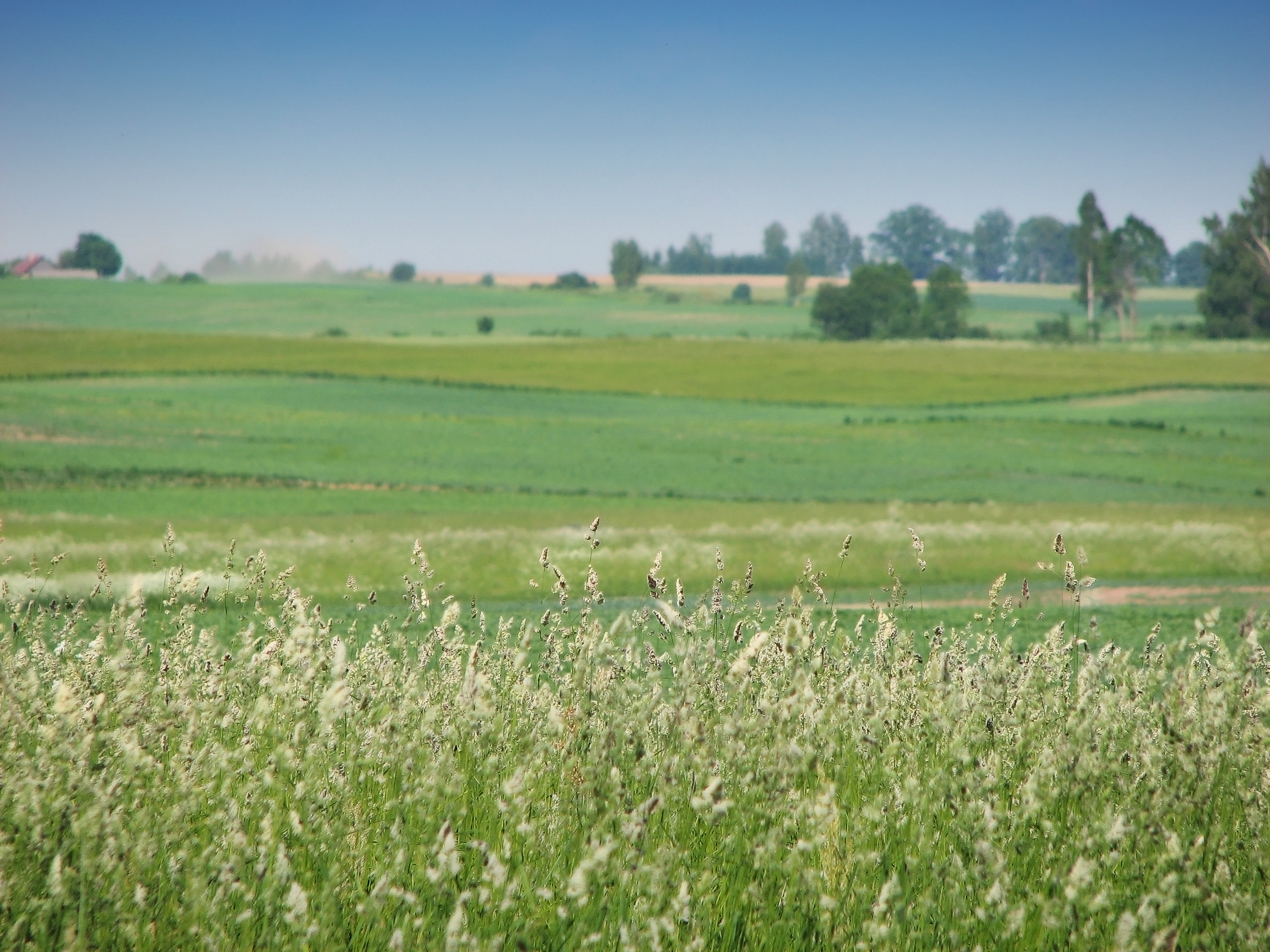 Maļinova Parish, Latvia